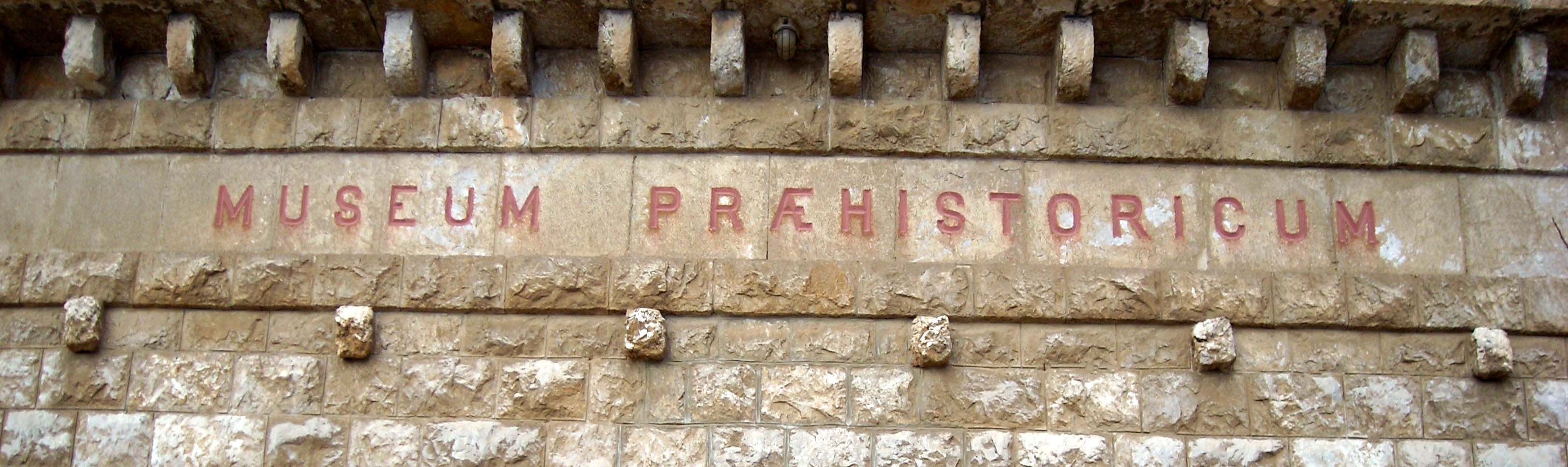 Iscrizione del "vecchio museo" dei Balzi Rossi, costruito in 1898, del mecenate inglese sir Thomas Hanbury.